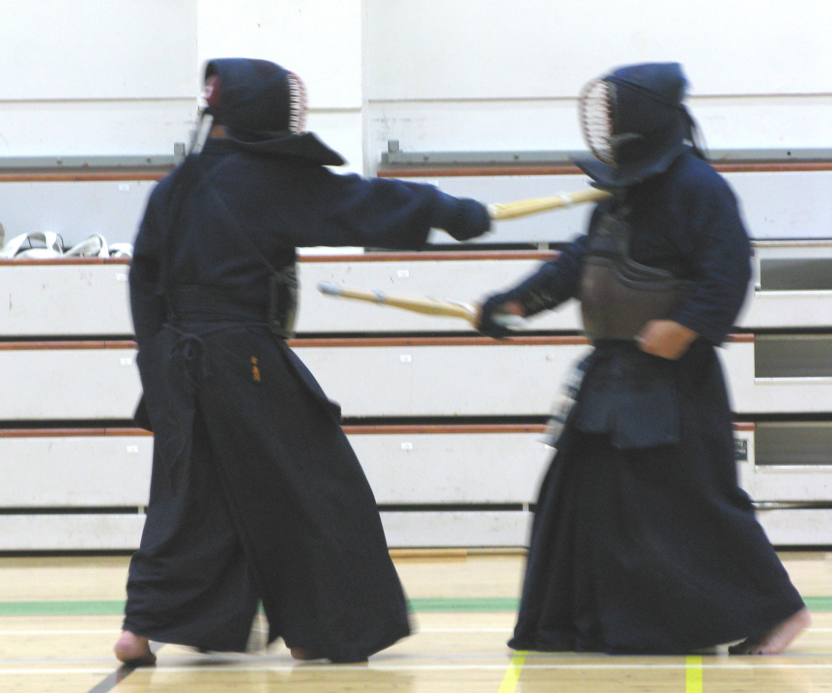 Tankendon pisto kurkkuun